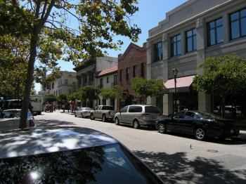 Santa Cruz USA 2004 Gł. Ulica. Zdjęcie własne